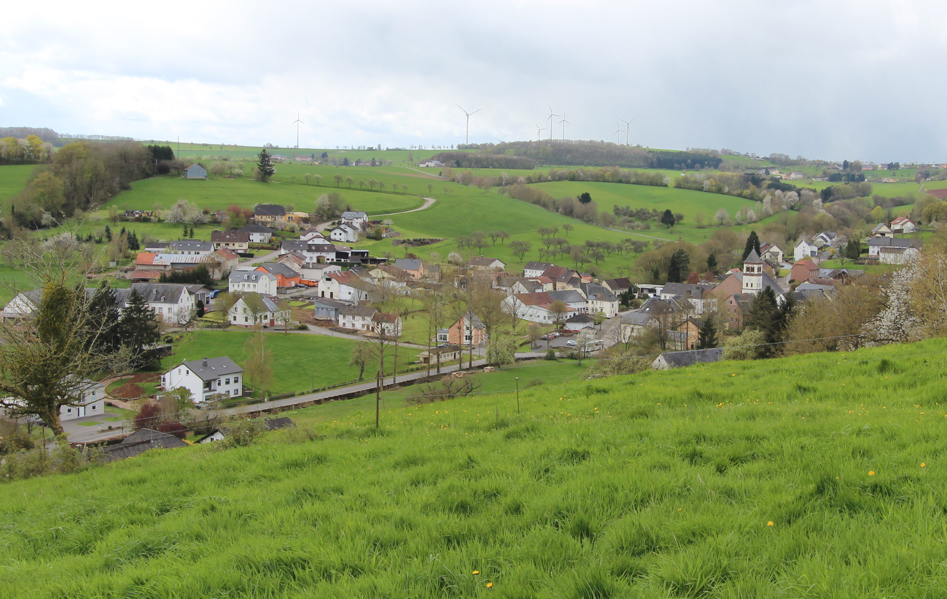 Ansicht von Baustert. Aufnahmeort: Wolfsgracht. Aufnahme aus Nord-Ost.